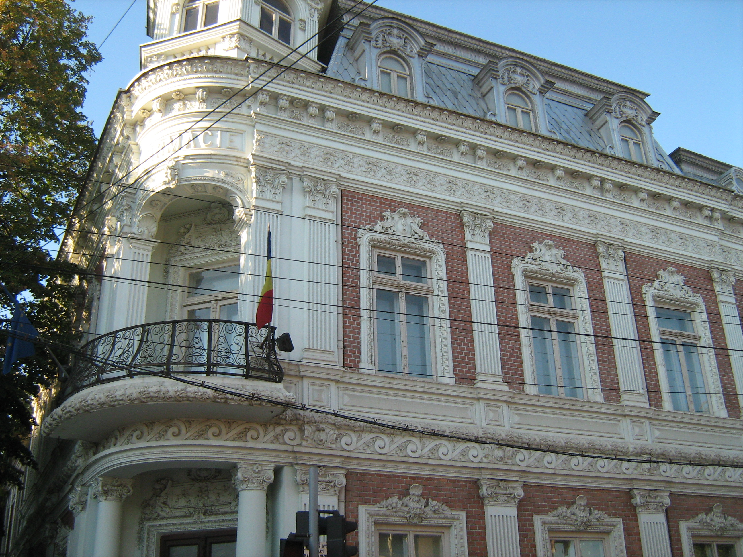 Galaţi, Farmacia Ţinc